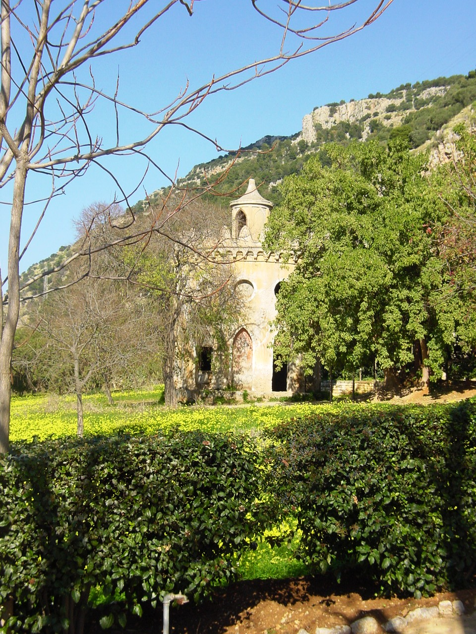 Riserva naturale Monte Pellegrino Palermo, Sicily Scuderie Reali